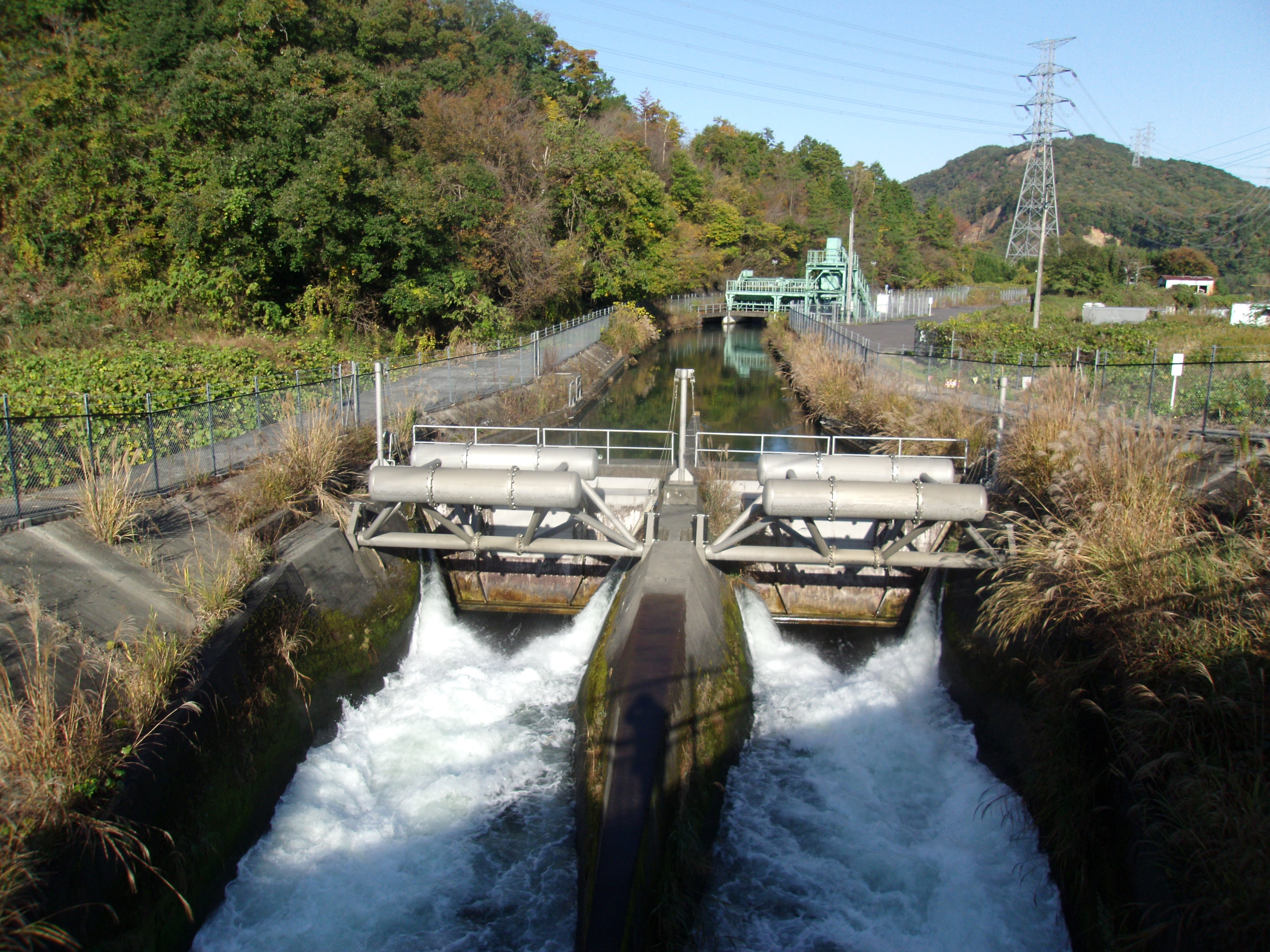 「愛知用水」：犬山市の尾張富士を刳り貫いて再度地表に現れ、入鹿池からの導水をうけ水量と流速が増加